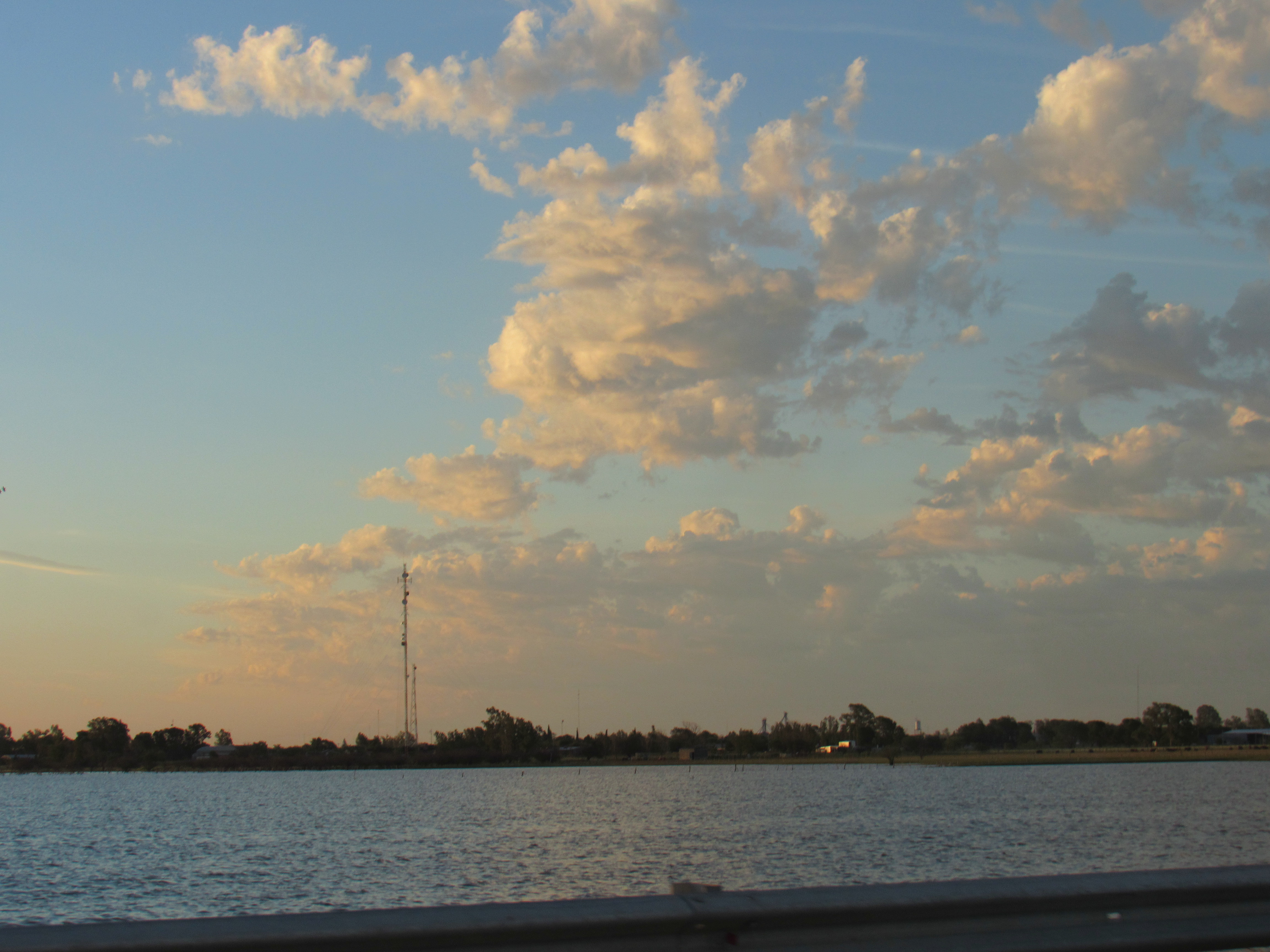 Embajador Martini desde la Ruta Nacional 35. En primer plano, la Laguna Chadilauquen crecida que en 2017 llegó a cortar dicha ruta.